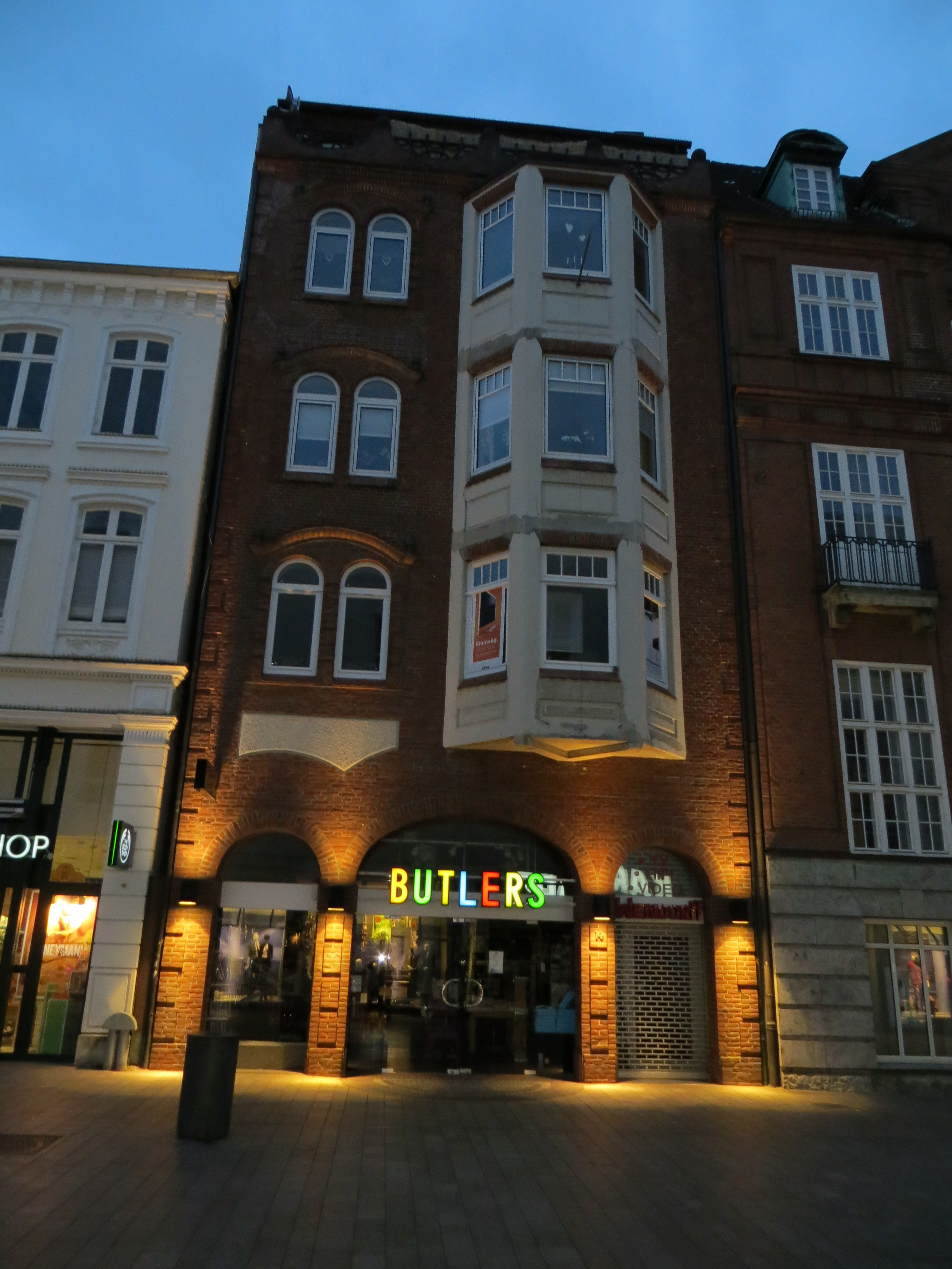 Wohn- und Geschäftshaus, Holm 14 von 1906 mit einer überarbeiteten Fassade von Paul Ziegler, Bild 02